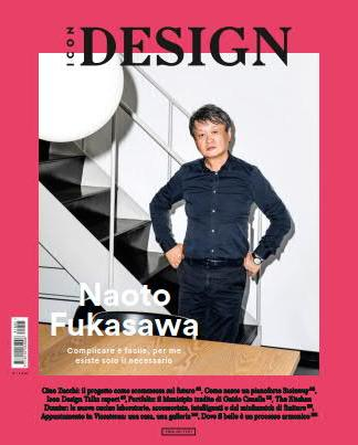 Copertina della rivista Icon Desig giugno 2018, Arnoldo Mondadori Editore.